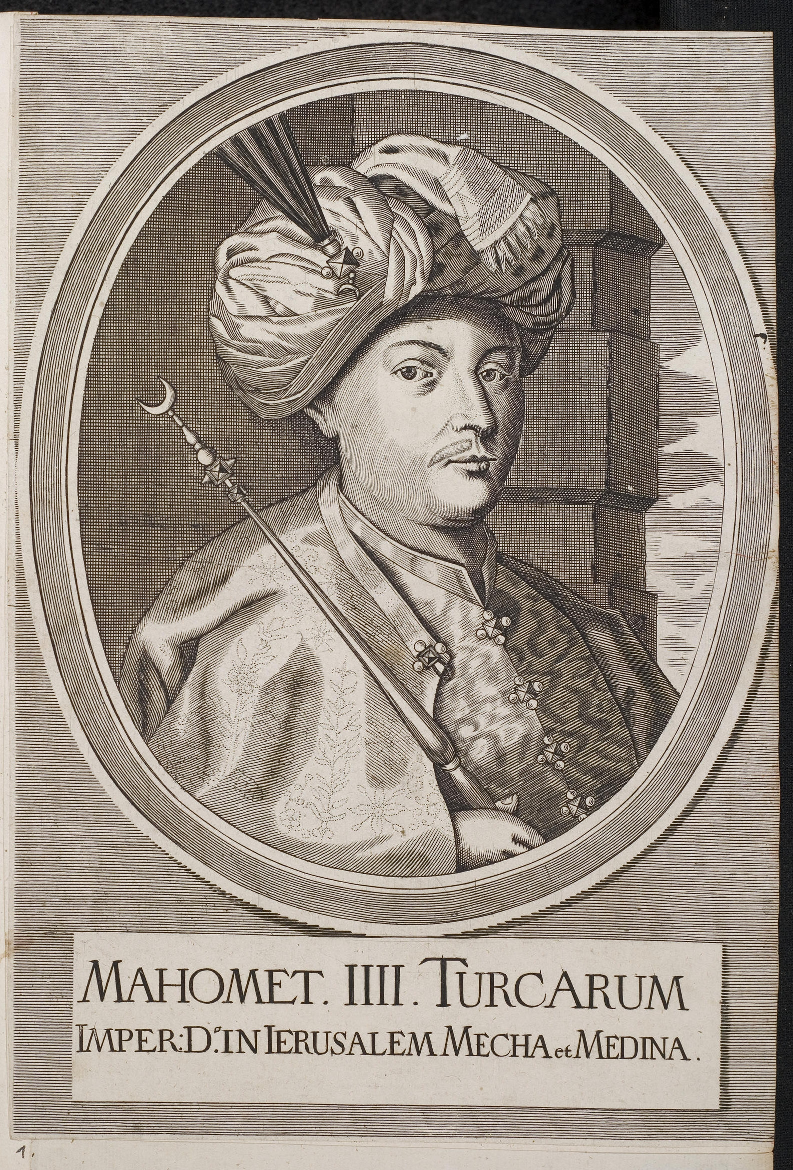 Grafik aus dem Klebeband Nr. 2 der Fürstlich Waldeckschen Hofbibliothek Arolsen Motiv: "Mahomet IIII Turcarum Imper. Do. in Ierusalem Mecha et Medina" (Mehmed IV..)